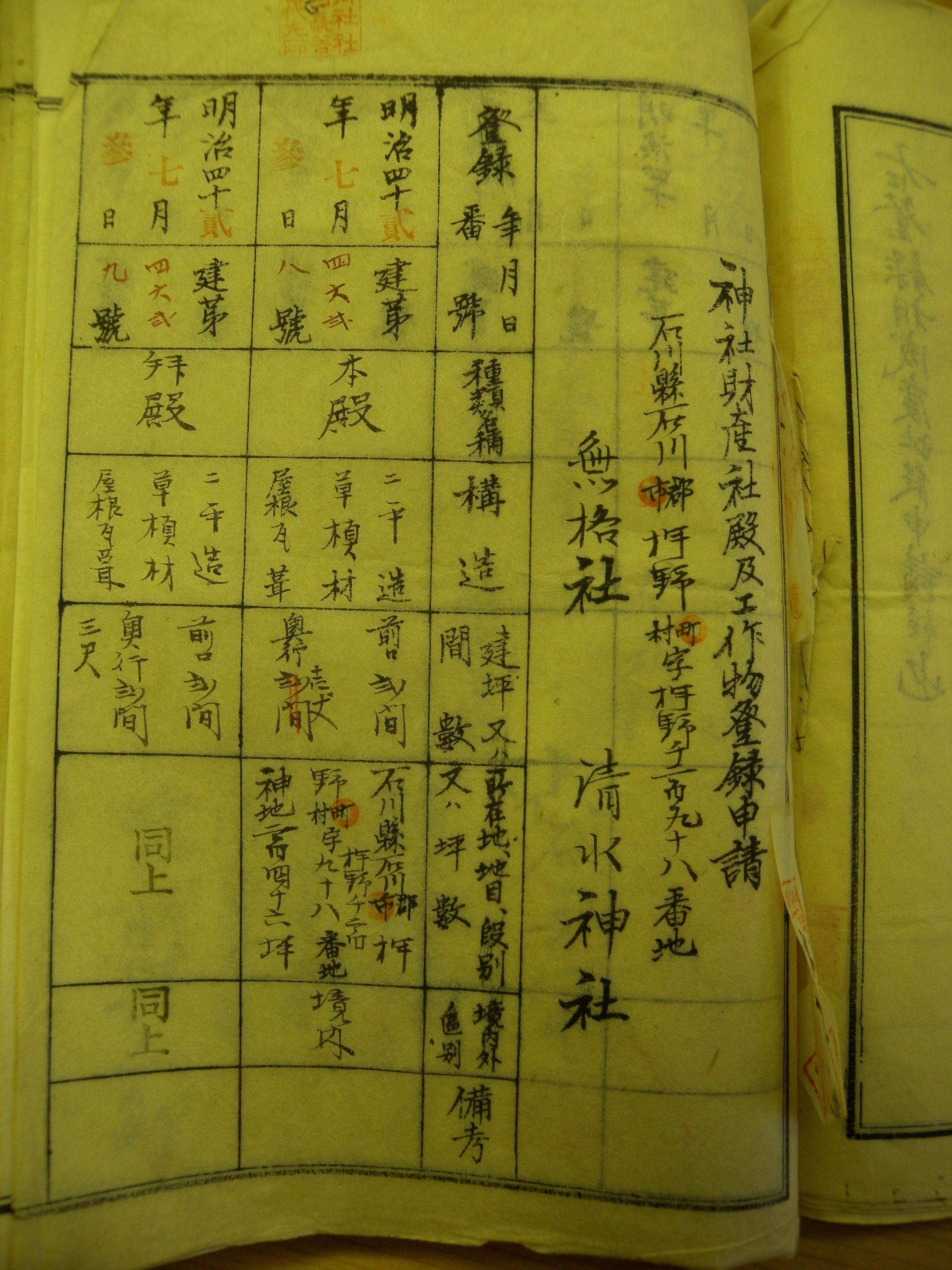 東部の比め社の明治末期登録書